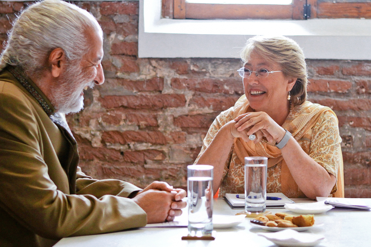 Alfredo Sfeir anunció su apoyo a Michelle 05/12/2013